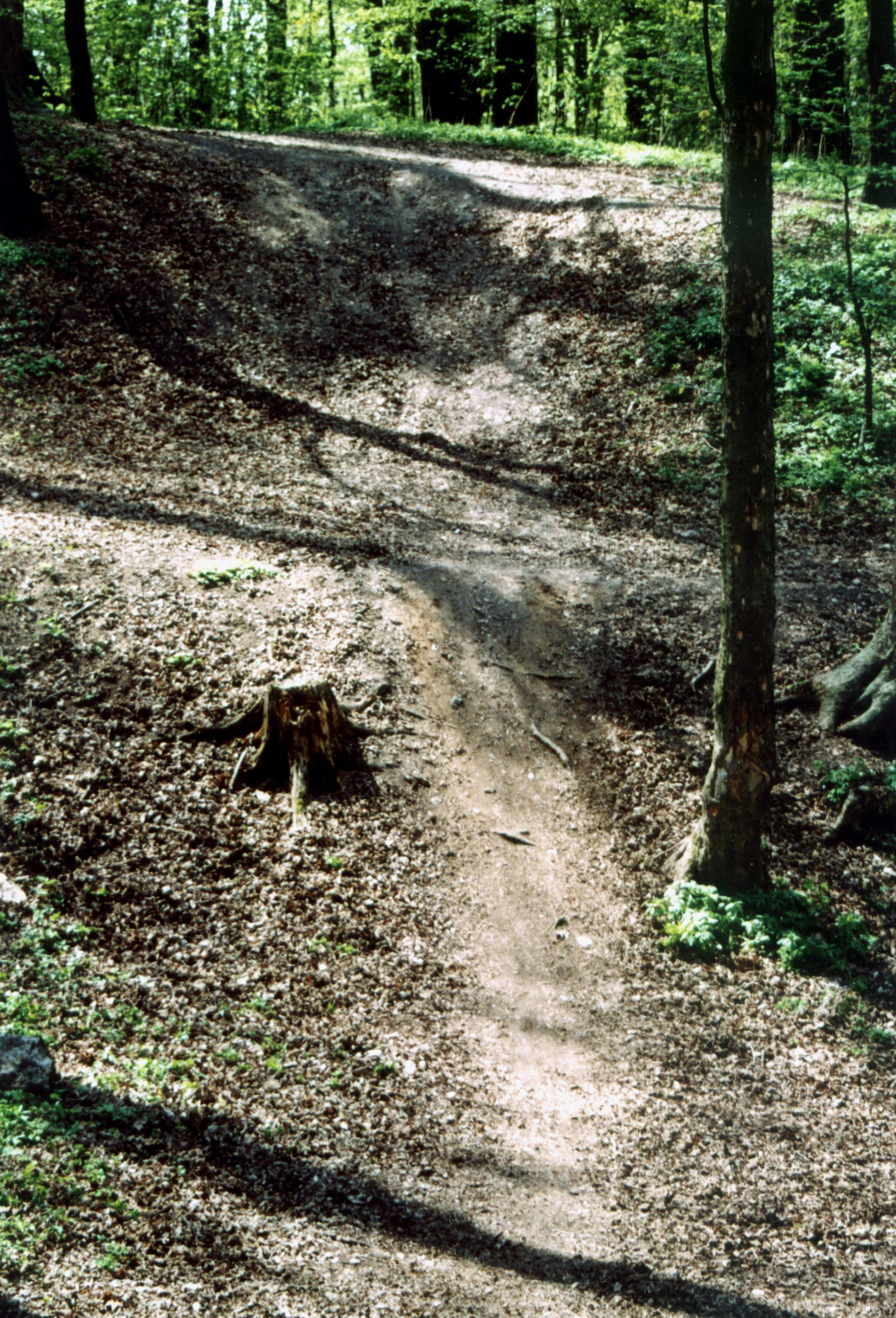 Zdewastowana część Góry Grojec w gminie Woźniki, powiat lubliniecki